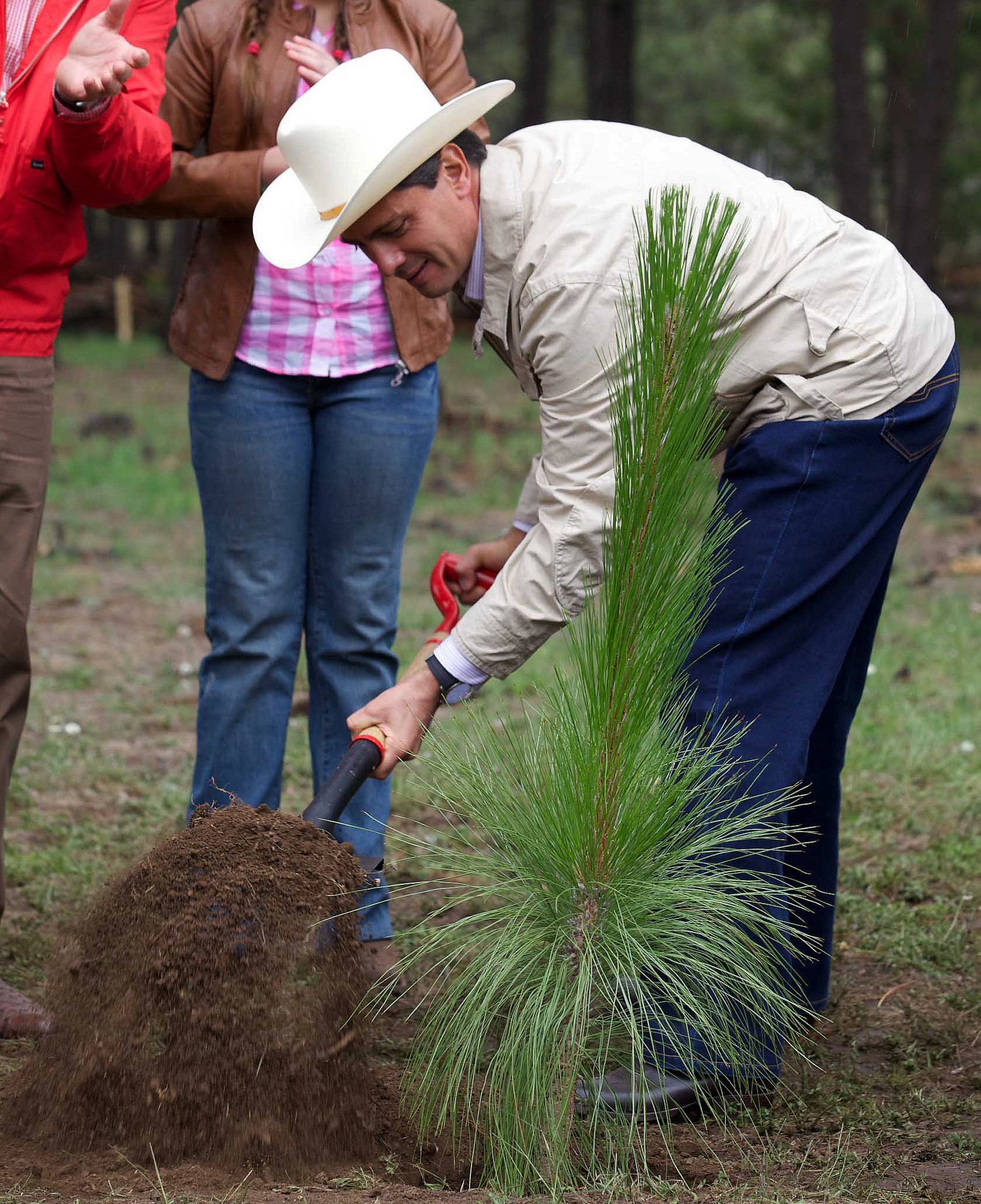 Conmemoración del Día del Árbol en México. Balleza, Chihuahua. 10 de julio de 2013.